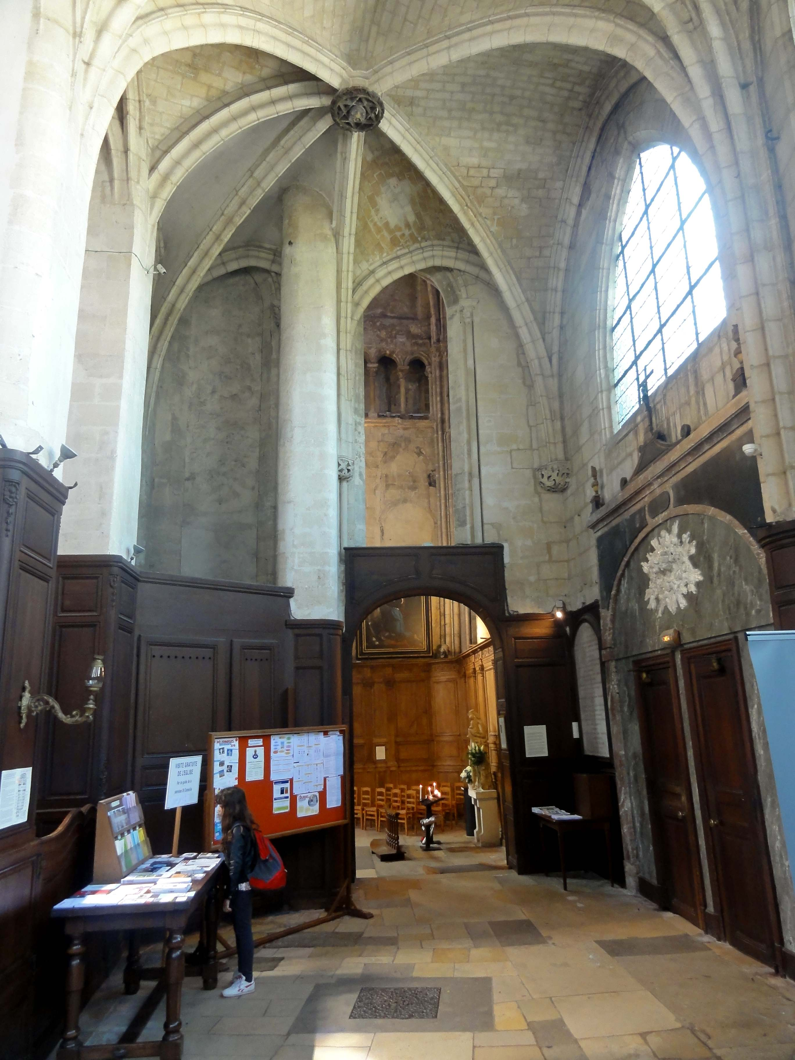 Déambulatoire - voir le titre du fichier.